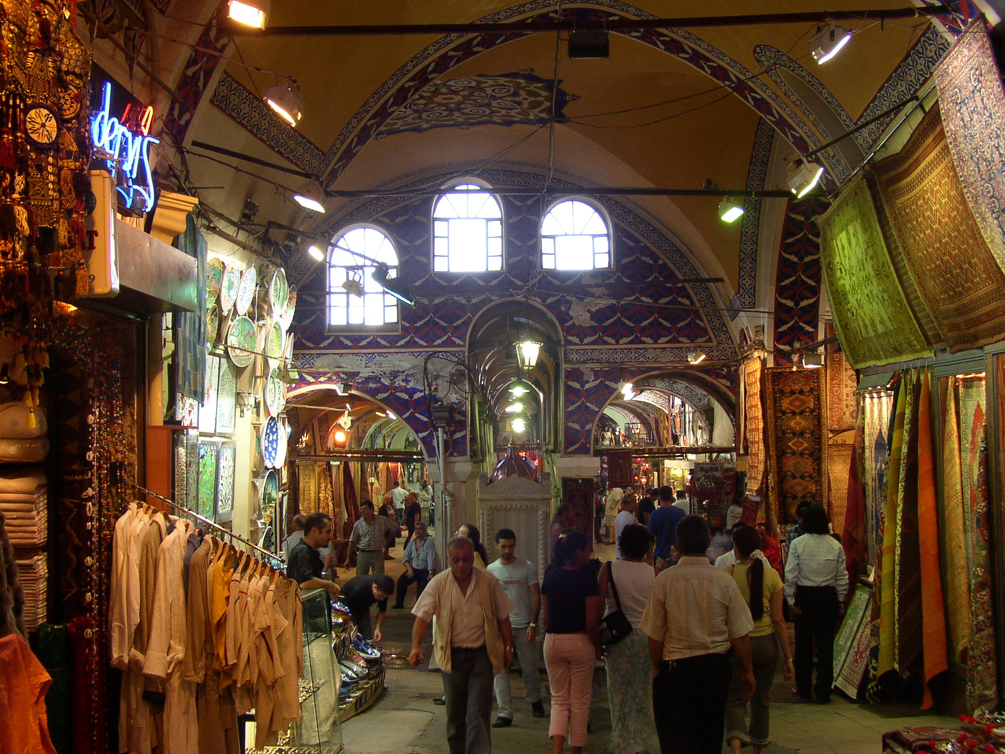 Il coloratissimo Gran Bazar di Istanbul Immagine realizzata da pnc_net